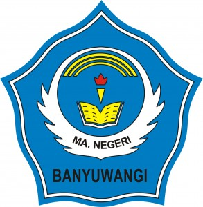 Logo MAN Banyuwangi